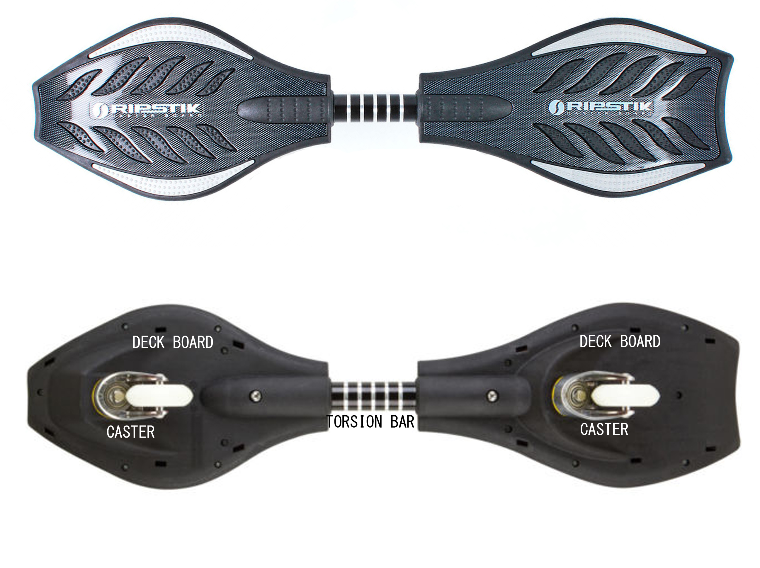 RIPSTIK DLX